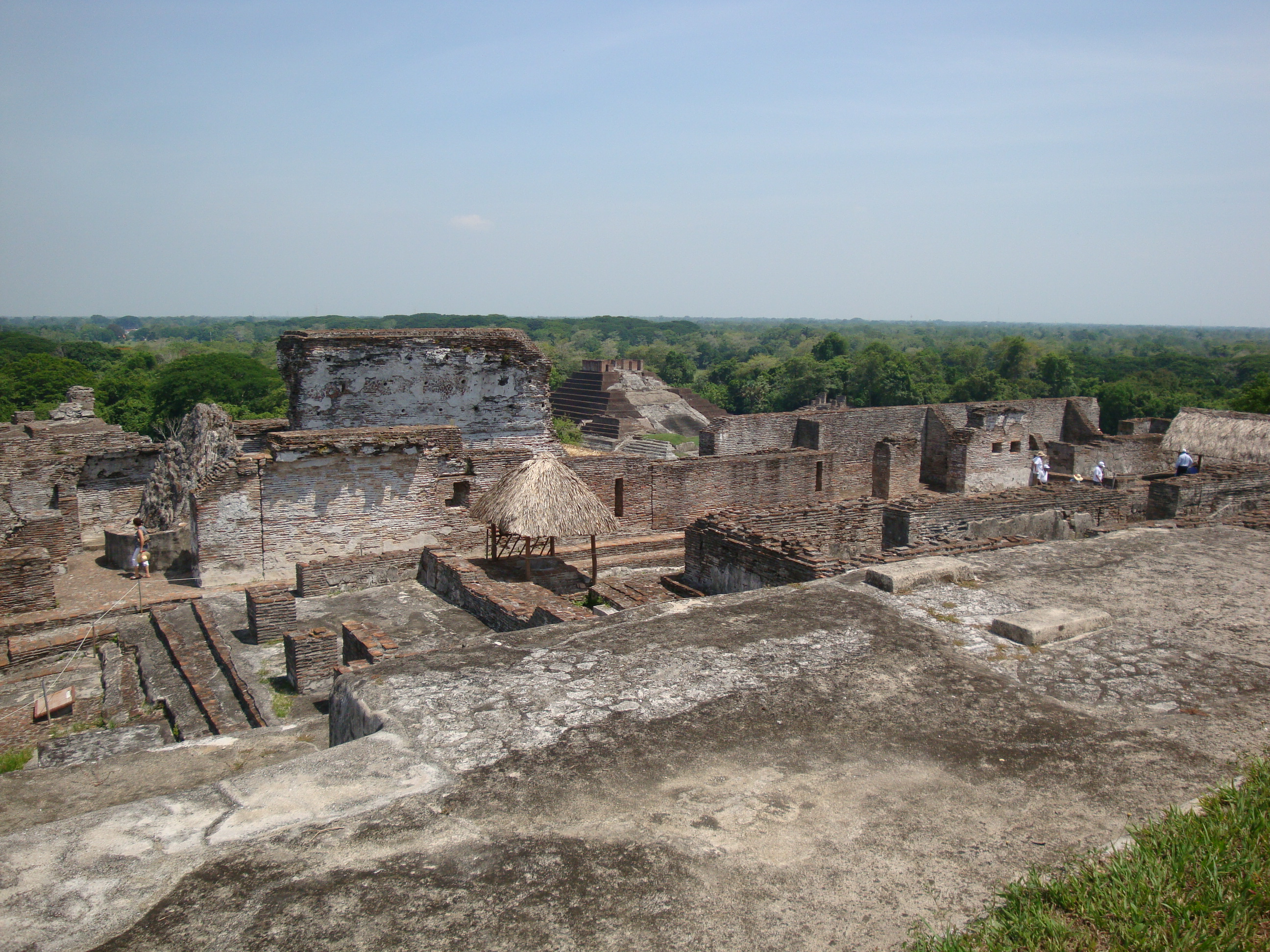 Conjunto llamado "La Gran Acrópolis" en la ciudad maya de Comalcalco, Tabasco, México.